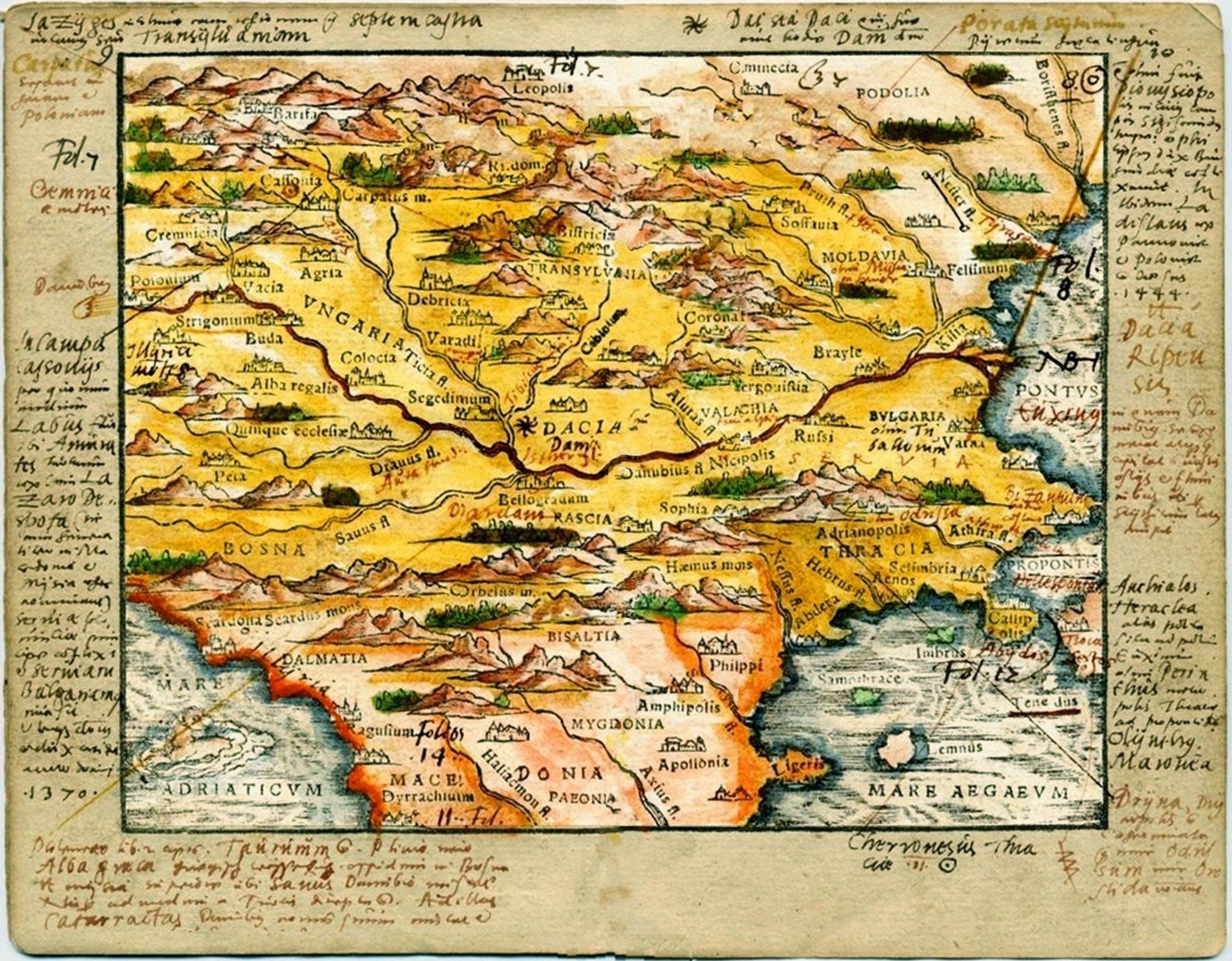 Septemcastrensis de Corona - improved